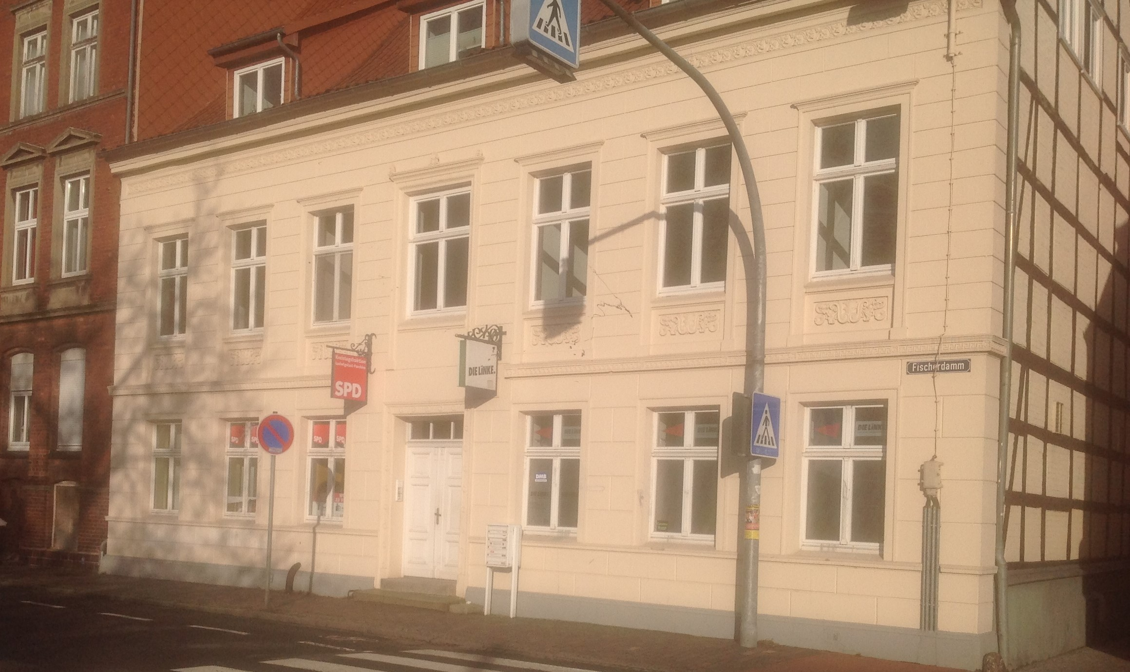 Haus Fischerdamm 13 in Parchim mit den Geschäftsstellen von SPD und Linker